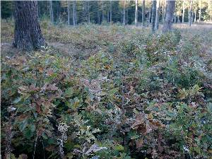 Traubeneichensaatfläche im Spessart, 4jährig